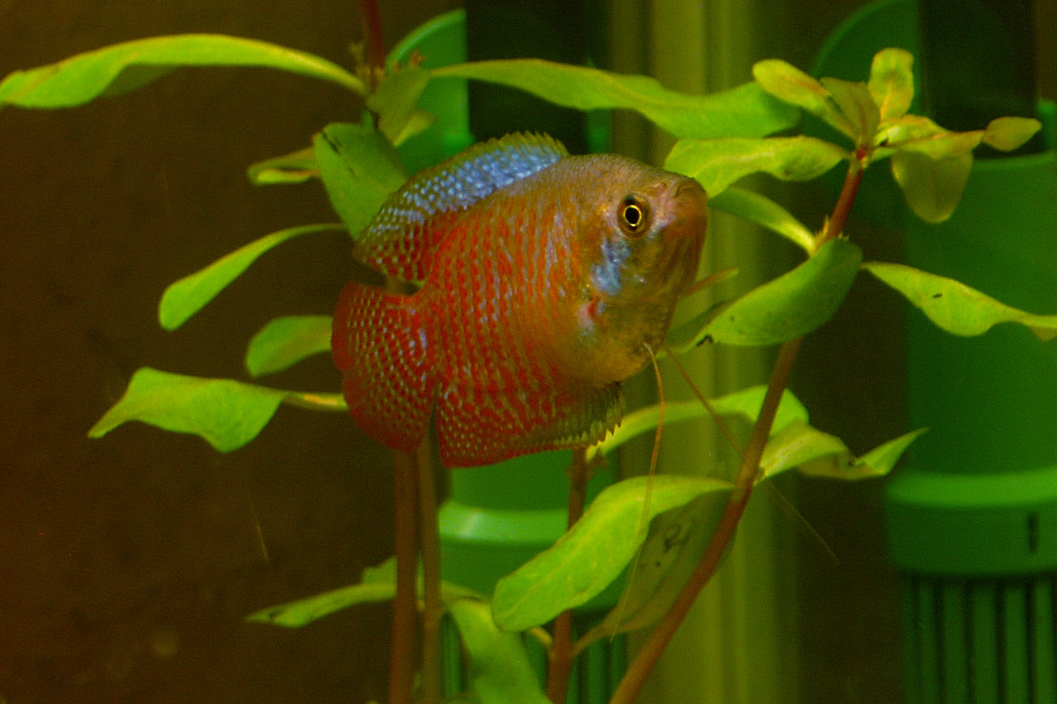 Zwergfadenfisch Colisa lalia